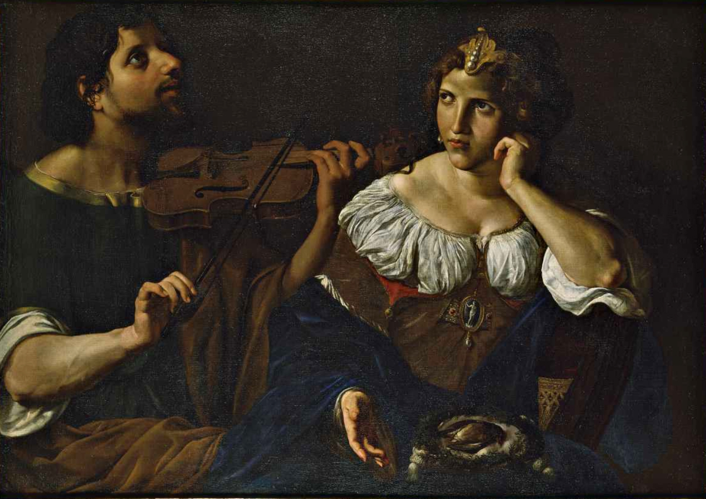 Lesbia piange per la morte del suo passerotto